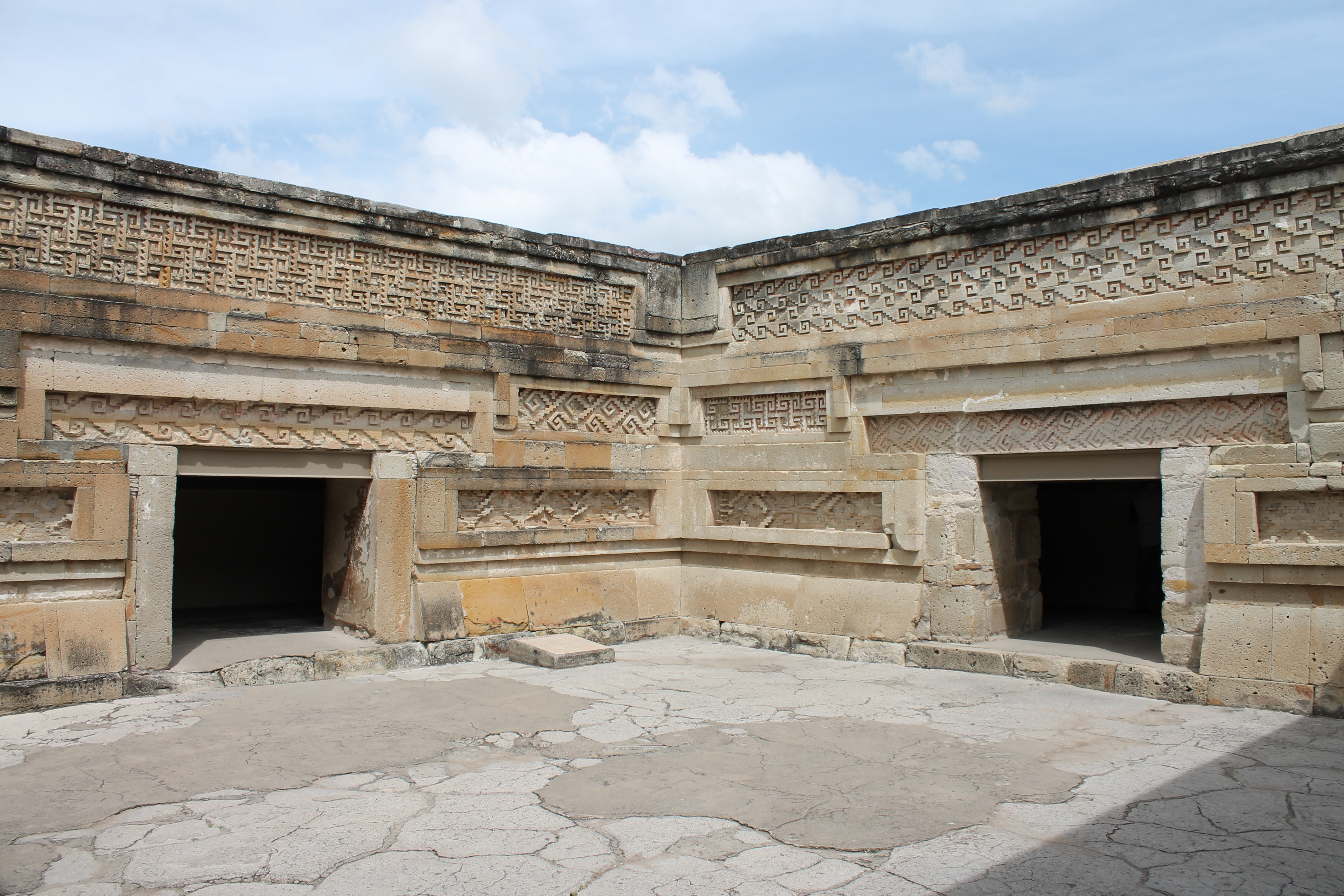 Se muestra uno de los tres patios que hay en el Grupo de las Columnas, este patio está circundado por las 4 habitaciones del Palacio. Cada uno de los accesos mostrados conduce a una habitación diferente. Se aprecia una rica ornamentación en la parte superior de los muros con el uso de las grecas características de la zona.